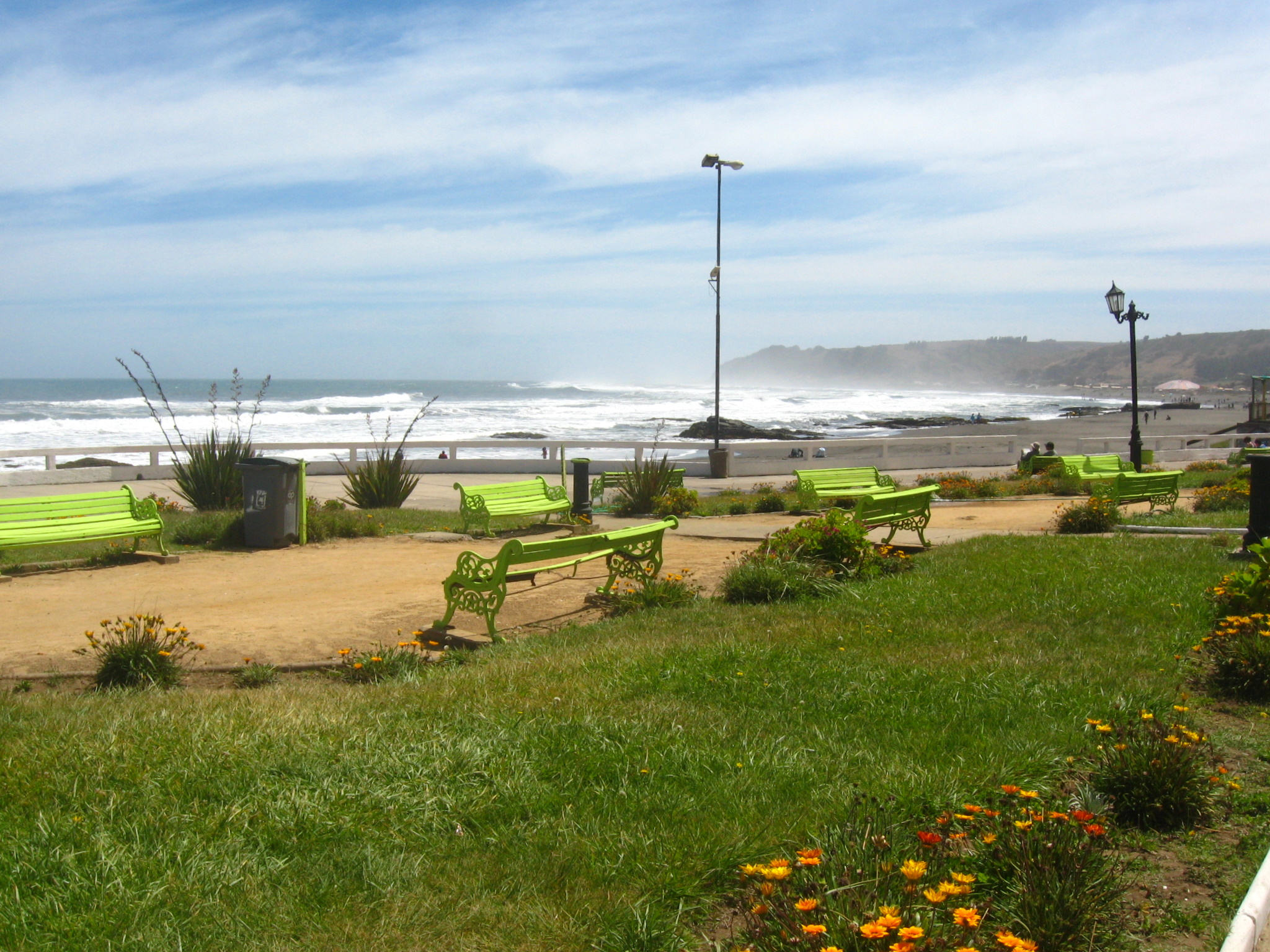 Plaza de Iloca. Iloca es un balneario ubicado en la comuna de Licantén, Provincia de Curicó (Región del Maule, Chile). Se encuentra a pocos kilómetros al sur del Lago Vichuquén. Según el Censo 2002, tiene una población de 345 habitantes, aunque durante la temporada de verano esta cifra se eleva considerablemente. Esta localidad fue una de las más dañadas por el terremoto de Chile de 2010, y sobretodo por el posterior tsunami que se produjo horas más tarde. Se habla de que un 70% de las construcciones quedó destruido tras la catástrofe.